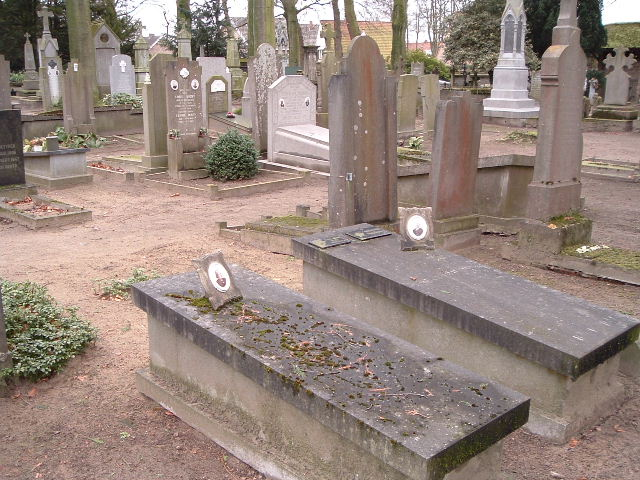 Grafzerken van A.J. Witteryck en echtgenote op het Brugs kerkhof te Steenbrugge